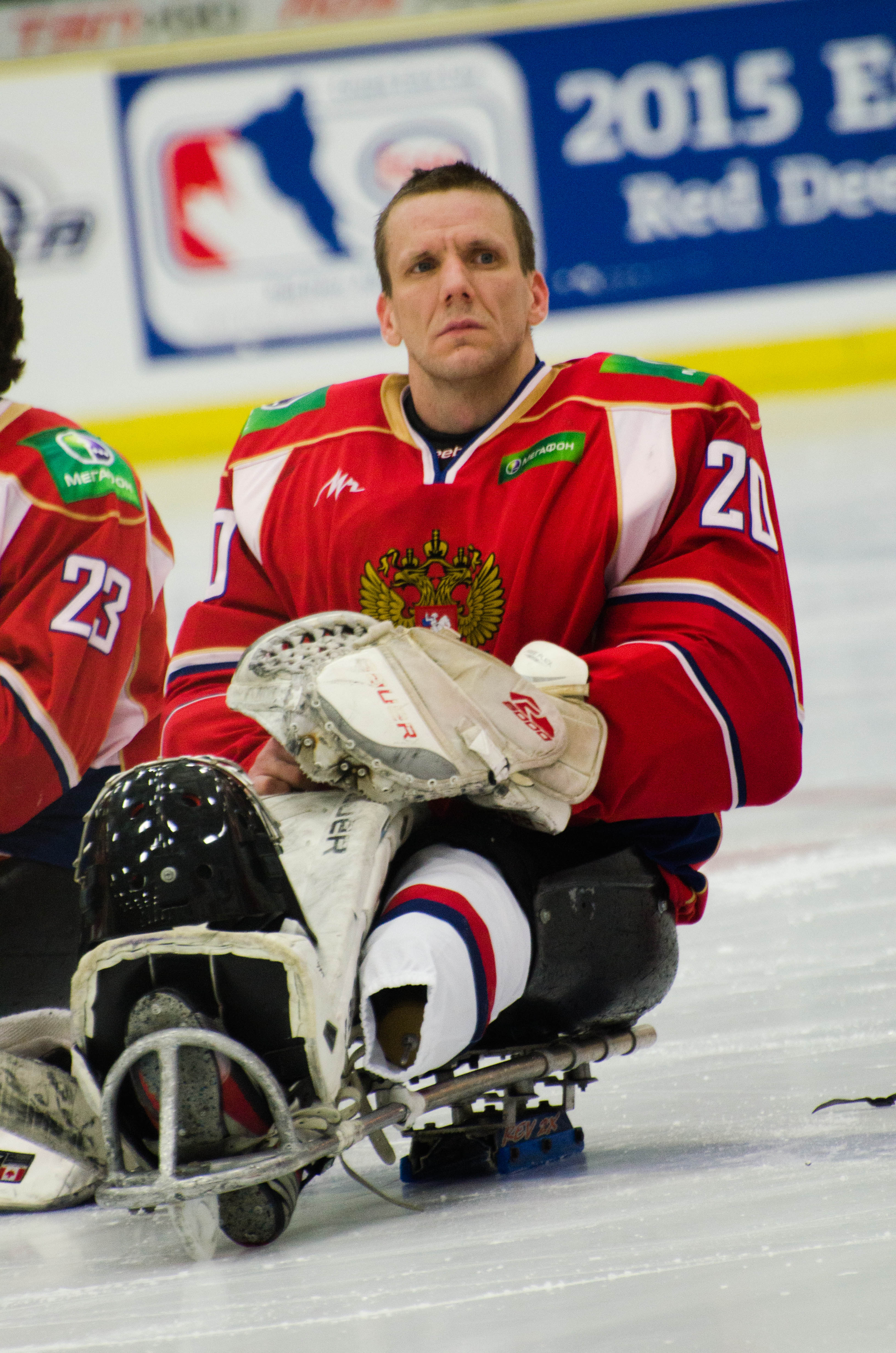 Vladimir Kamantsev, 2015